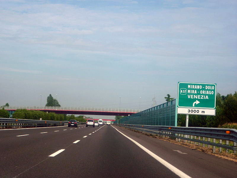 A4